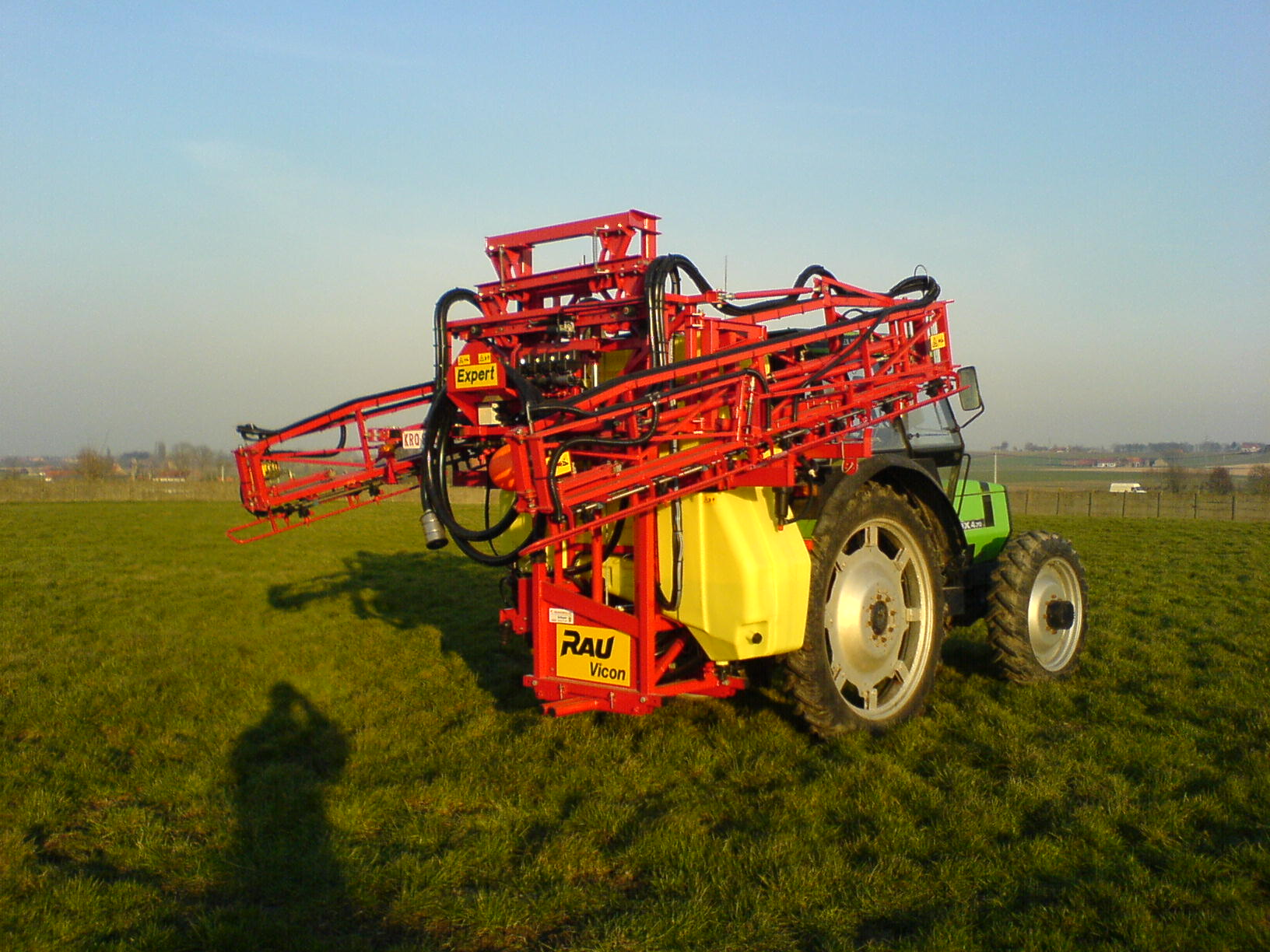 Deutz-Fahr DX 4.70; gedragen spuitmachine Rau Vicon Expert in transportstand